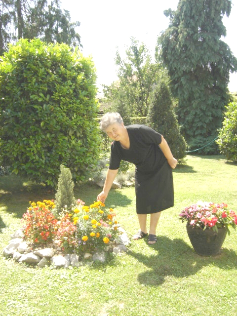 Volim Baranju, Beli Manastir, ekološka akcija; na slici Ljubica Bačvanin